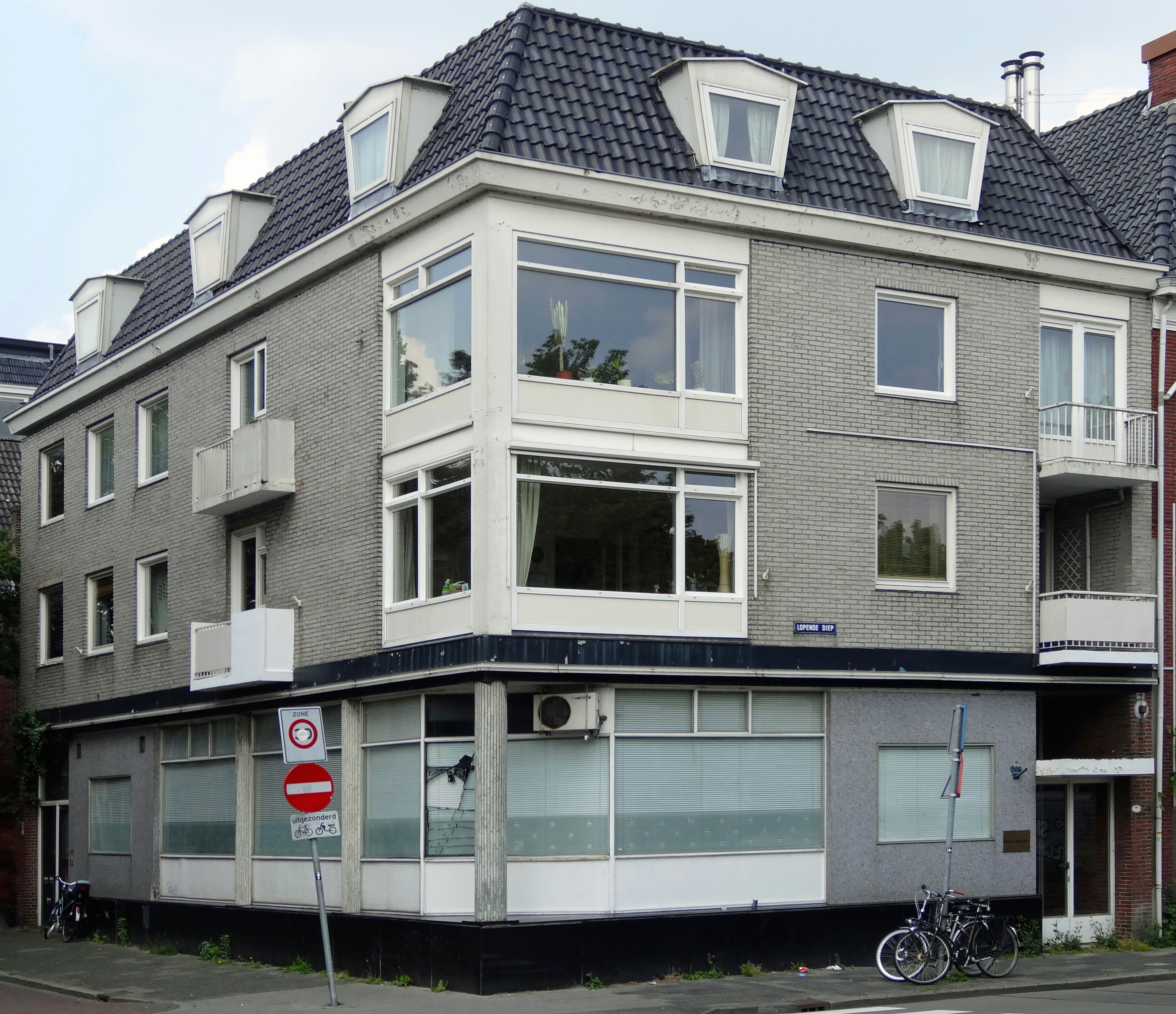 Voormalig kantoorpand "Eigen Haard"aan het Lopende Diep (hoek Nieuwe Kijk in 't Jatstraat Groningen